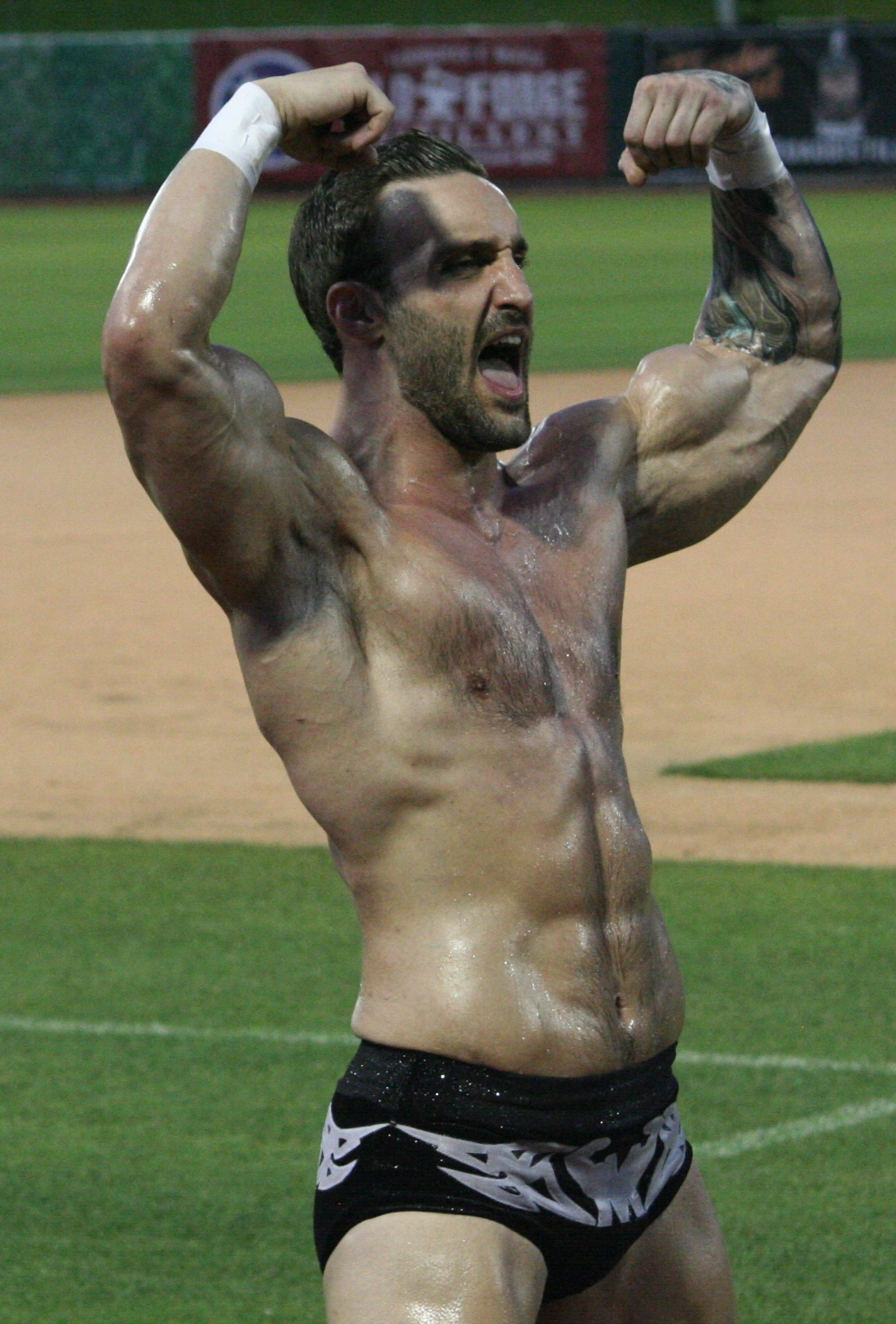 Chris Master en 2015 au cours d'un spectacle de la Global Force Wrestling